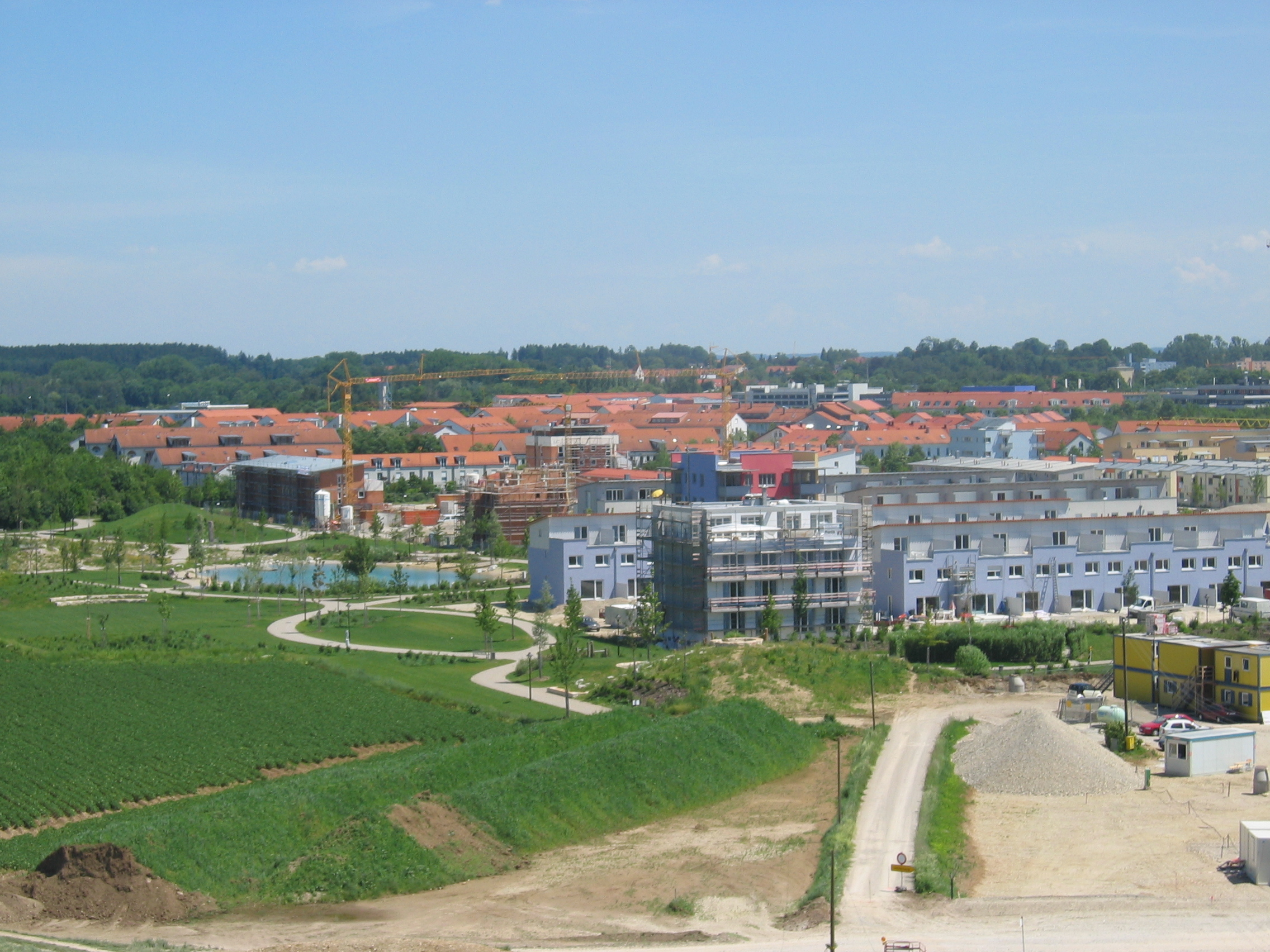 Blick ueber Poing